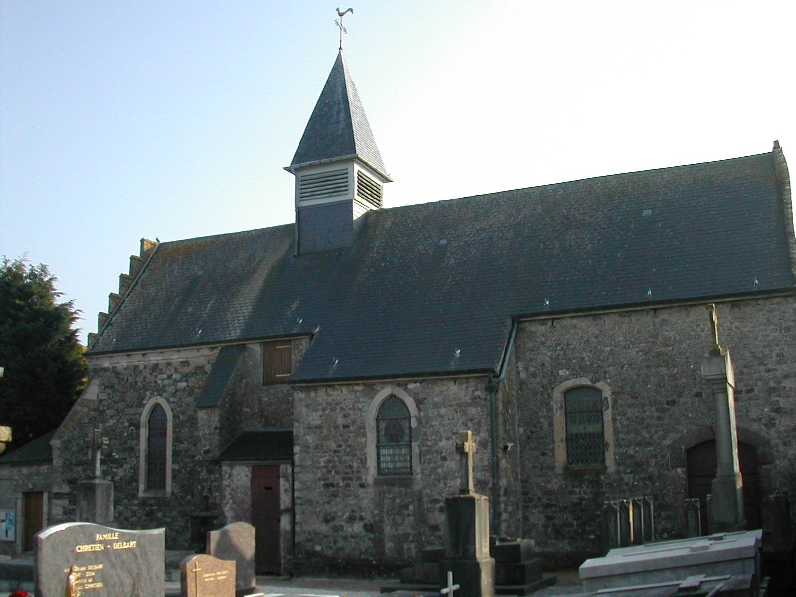 L'église de Saint-Inglevert.